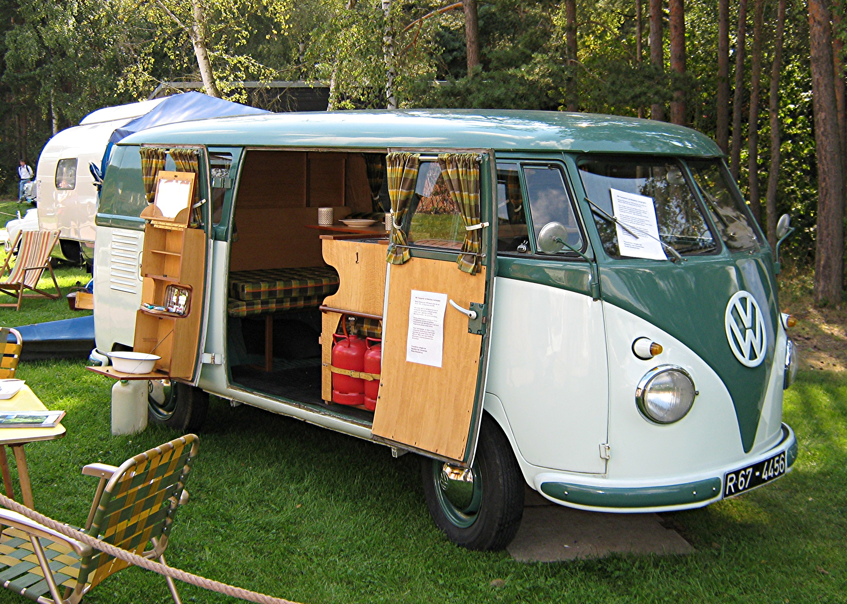 VW-Bus mit Westfalia Campingbox, einer leicht aus- und einbaubaren Zusatzeinrichtung für den VW T1-Transporter. Das Fahrzeug gehört dem Westfalia-Museum und wurde bei den Jubiläumsfeiern des Rheinischen Freilichtmuseums in Kommern gezeigt.